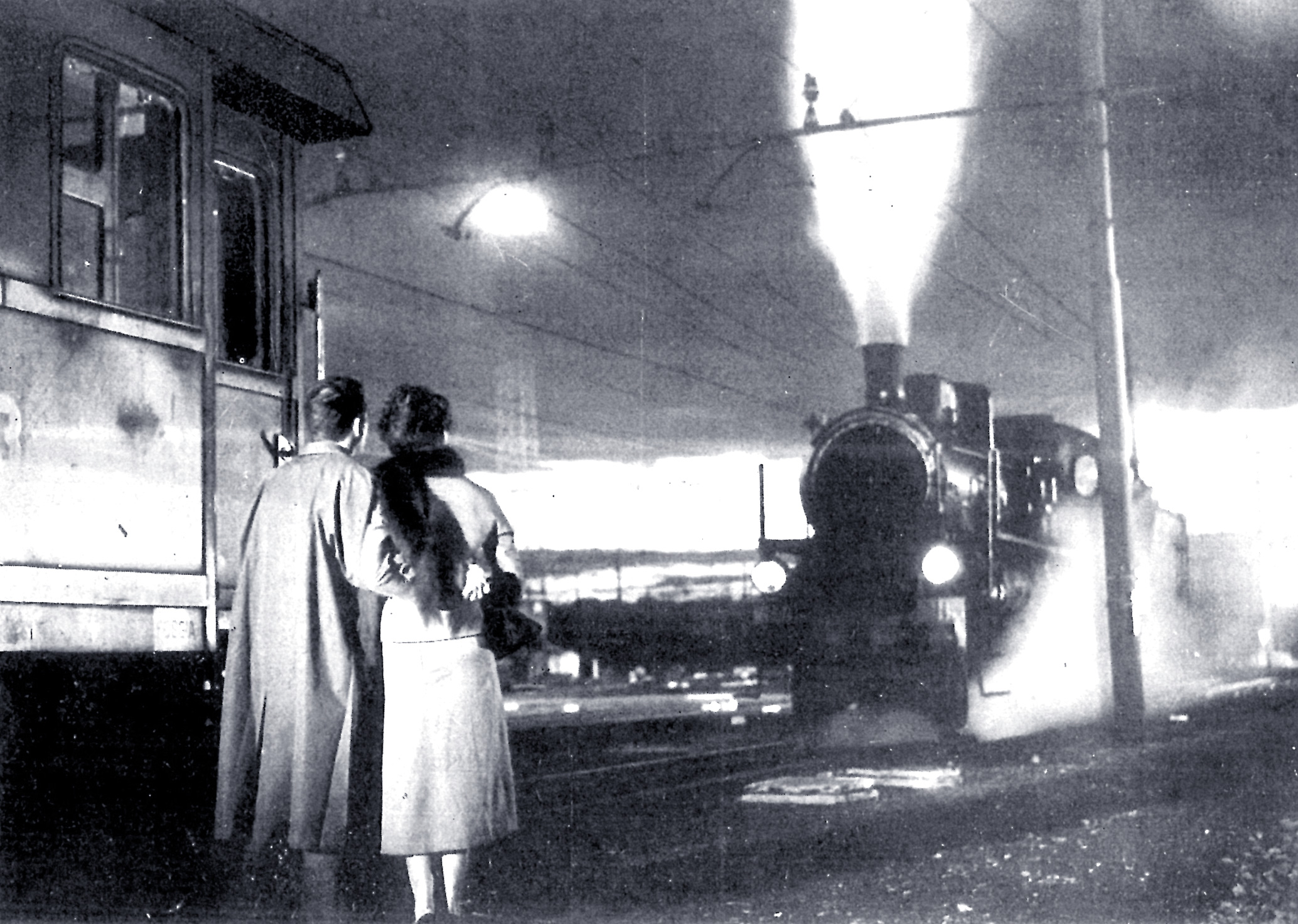 Montgomery Clift e Jennifer Jones in "Stazione Termini" (De Sica, 1953)